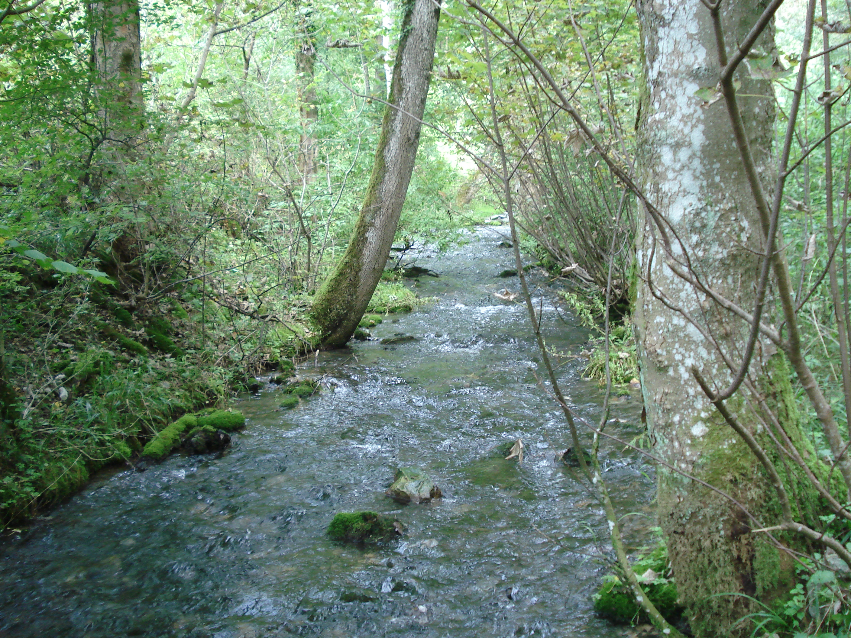 Die Weiße Lauter unterhalb ihrer Quelle